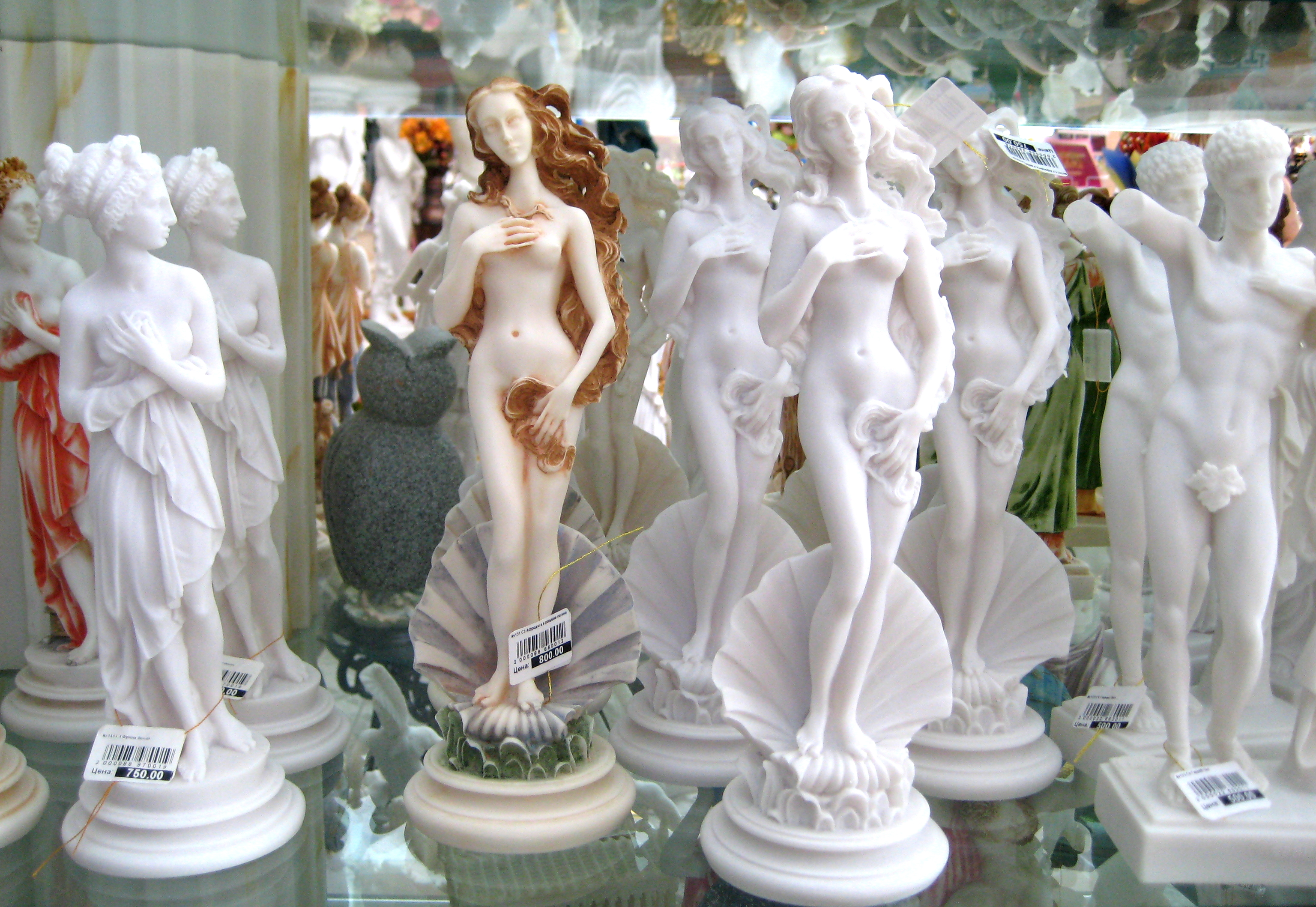 Souvenirs